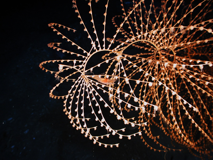 Iridogorgia sp